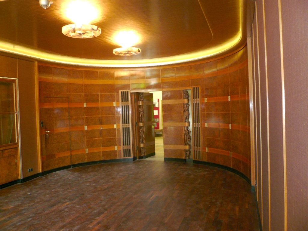 Haus K. in O. -Villa Reemtsma - in Hamburg Othmarschen : Esszimmer